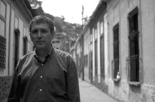 Israel Centeno en el pasaje II del barrio San Agustín, en Caracas, Venezuela.